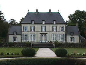 Malouinière de la Mettrie aux Louëts (Saint Coulomb, 35, Bretagne, France)